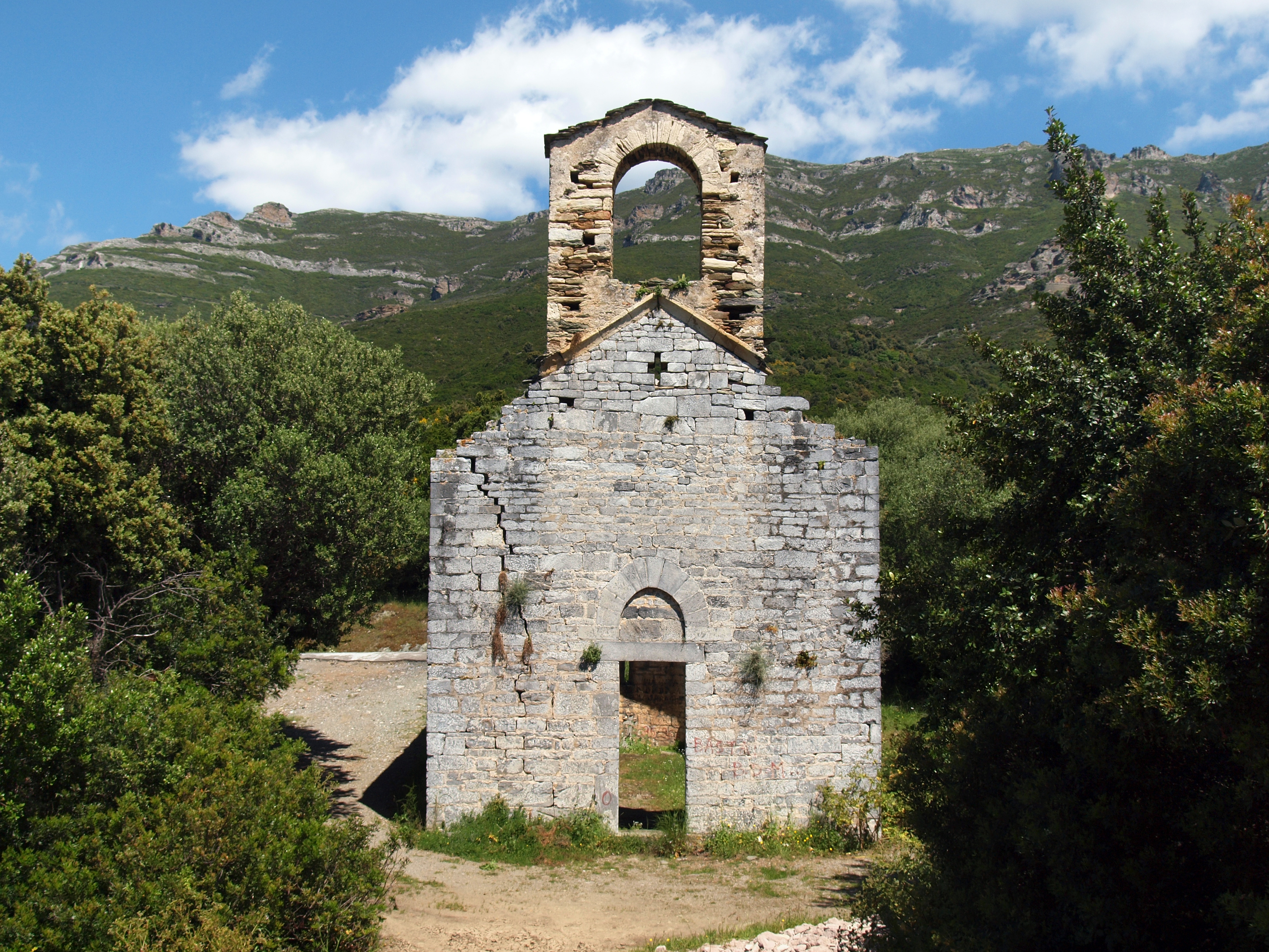 Poggio-d'Oletta, Nebbio (Corse) - Façade occidentale de l'ancienne chapelle San Quilico datée du XIe siècle, classée MH